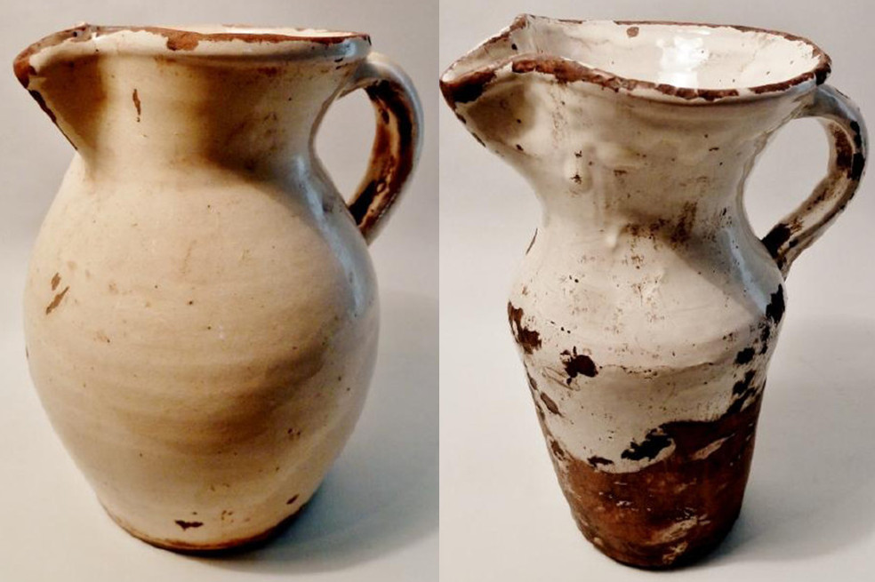 Dos tipos de jarra para chacolí, vino o agua. Loza blanca del Norte de España. Modelos usados, fabricados hacia 1950. Exposición de alfarería. Navidad. Casa de Aragón, Madrid.